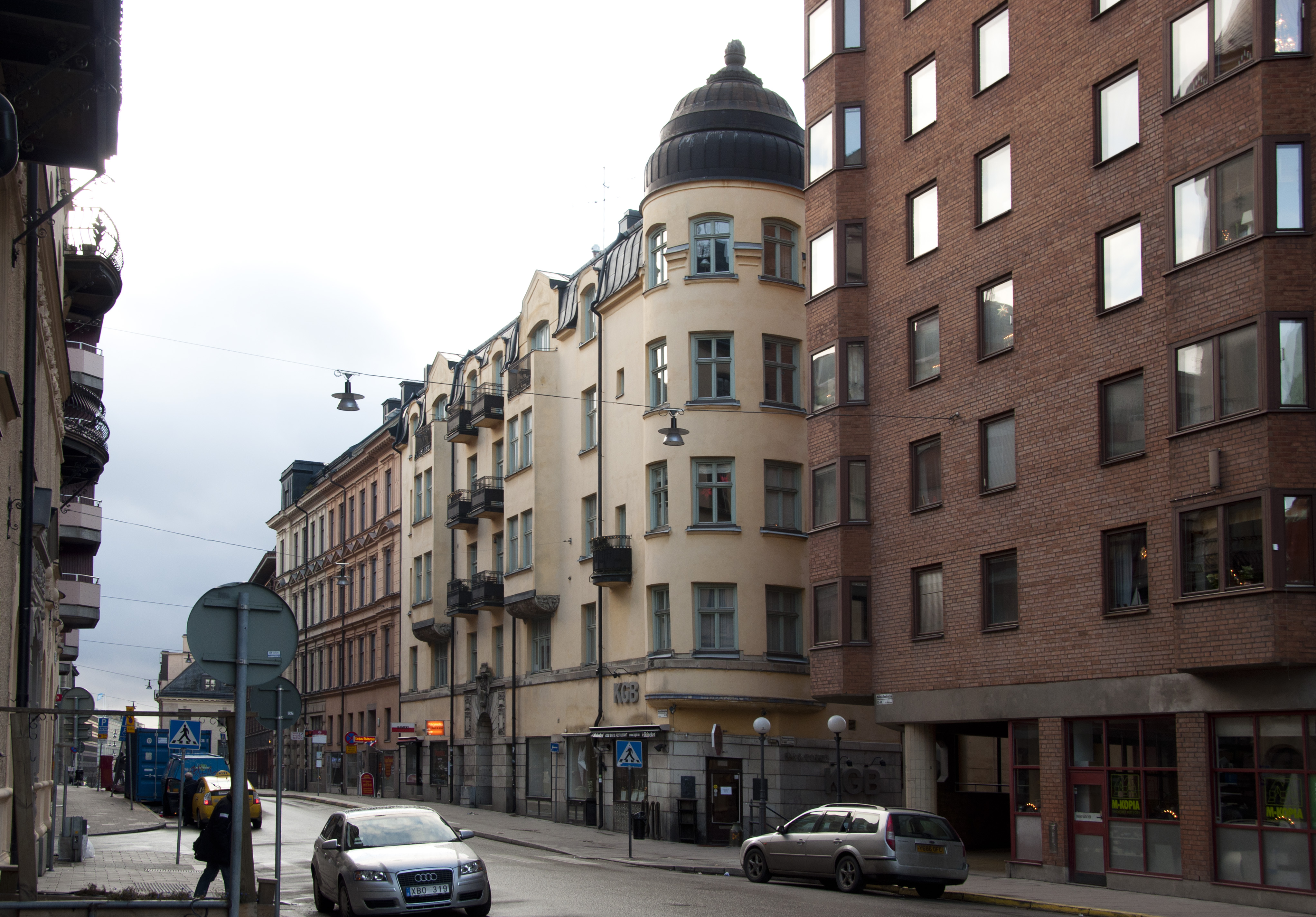 Oxögat 1&2, Malmskillnadsgatan 45, Byggnadsår 1858-59, arkitekt C N Söderberg, byggherre C J Lilljequist. 1907 genomgripande ombyggnad, ny fasad arkitekt G Detthoff.